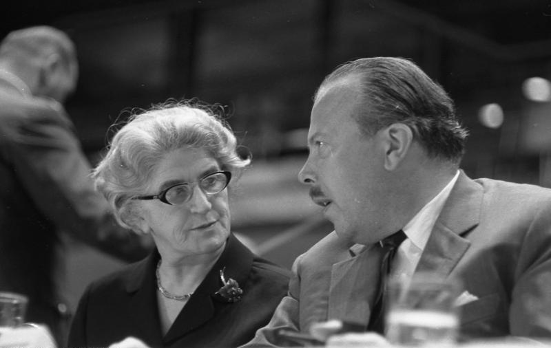 Bundeskanzler Kiesinger bei einer öffentlichen Kundgebung in der Friedrich-Ebert-Halle in Ludwigshafen (v.l.n.r.: Aenne Brauksiepe, Karl Theodor Freiherr von und zu Guttenberg)